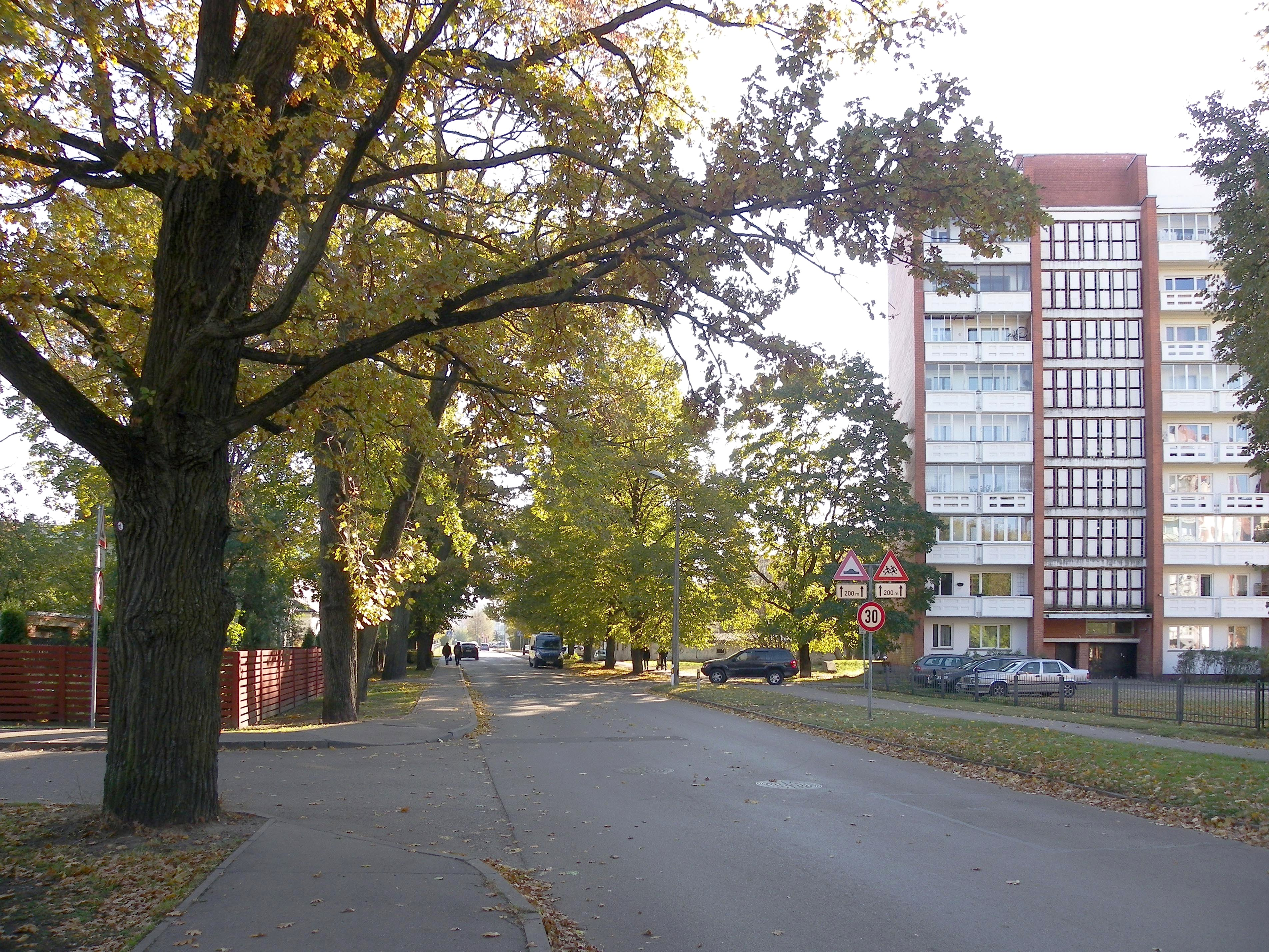 Ūnijas iela Rīgā